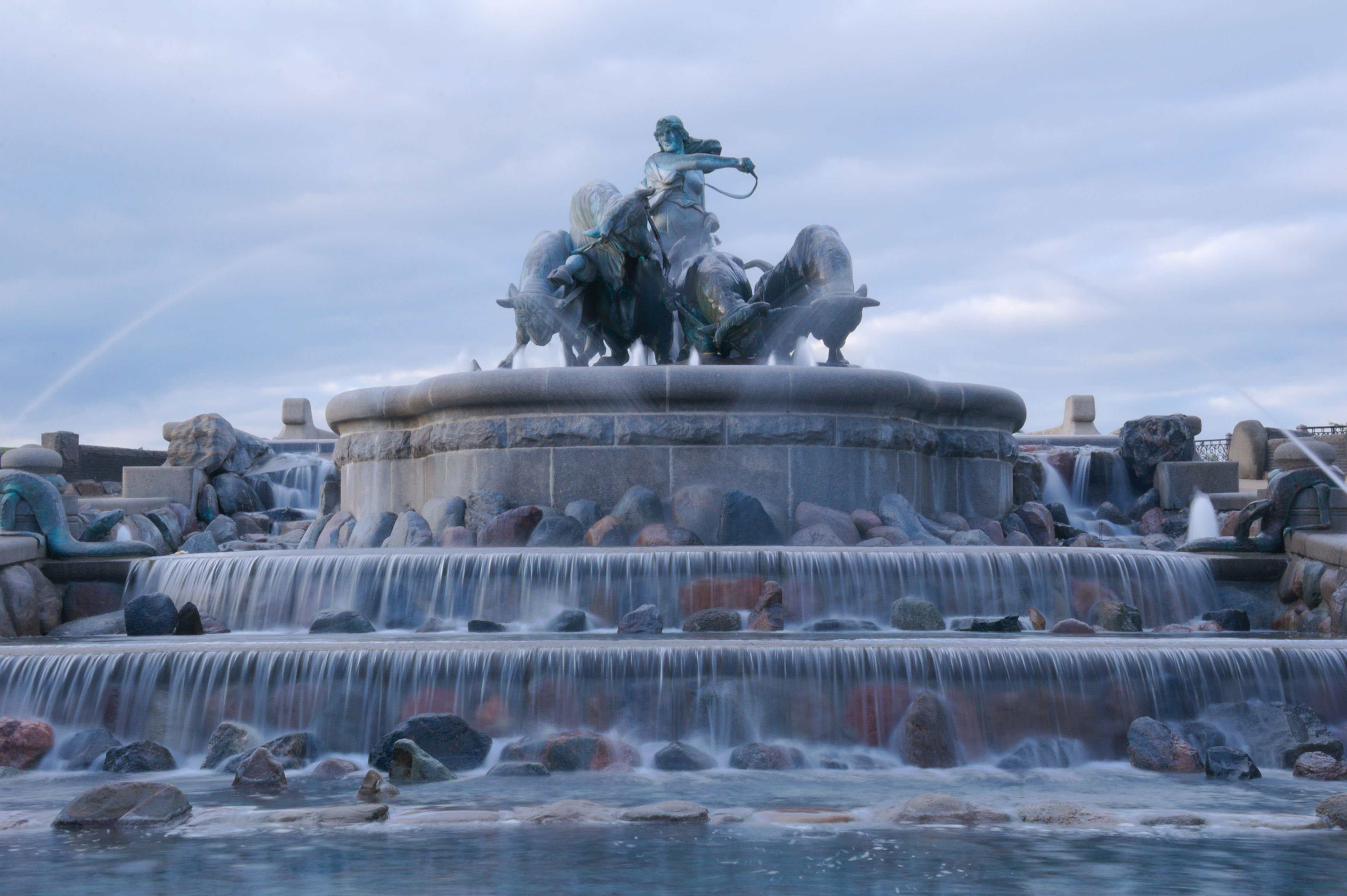 Gefionspringvandet, København